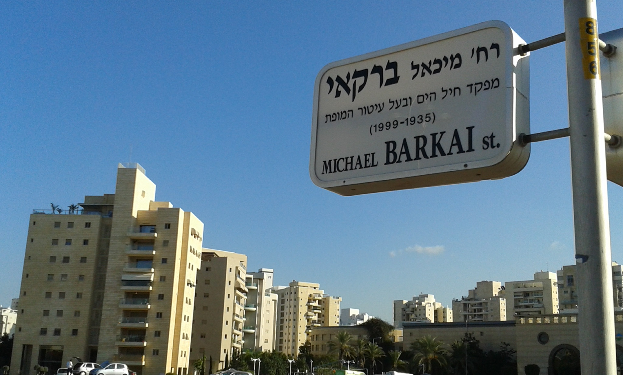 שלט רחוב על שם האלוף מיכאל ברקאי בחולון